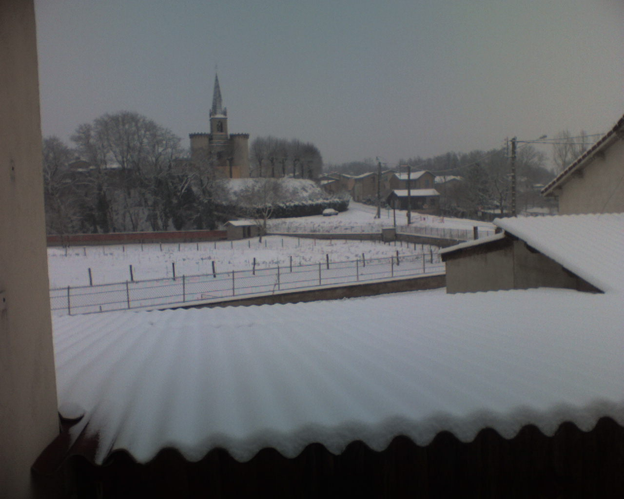 Photo de chez moi du centre de dorat avec son église en hiver _-*\Omega[17]/*-_